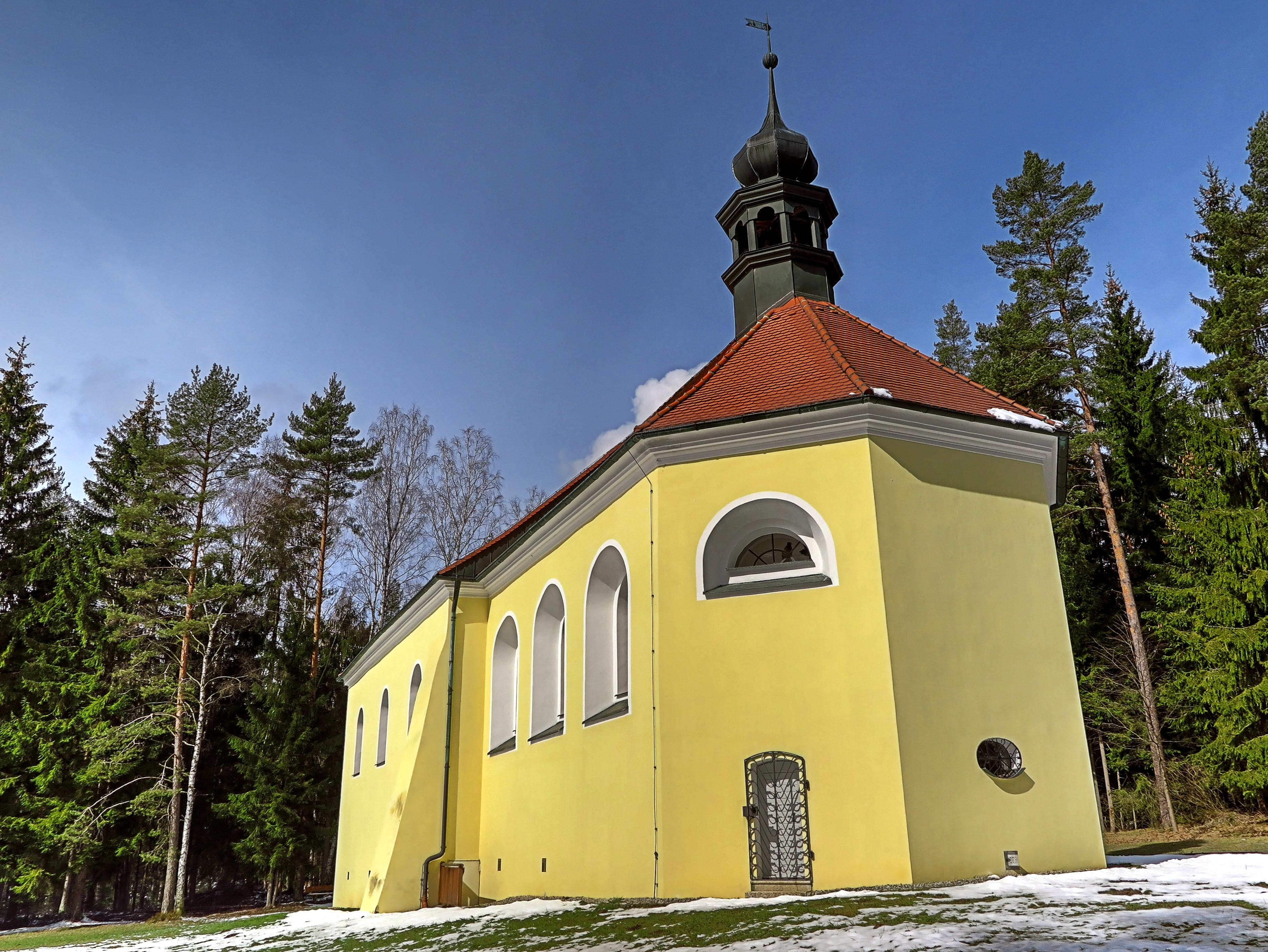 Deutschland, Bayern, Oberpfalz, Landkreis Tirschenreuth, Gemeinde Leonberg, westlich von Wernersreuth, Allerheiligenkirche, Blick von Osten, HDR-Image